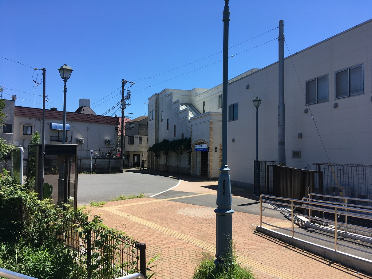 萩山駅北口広場